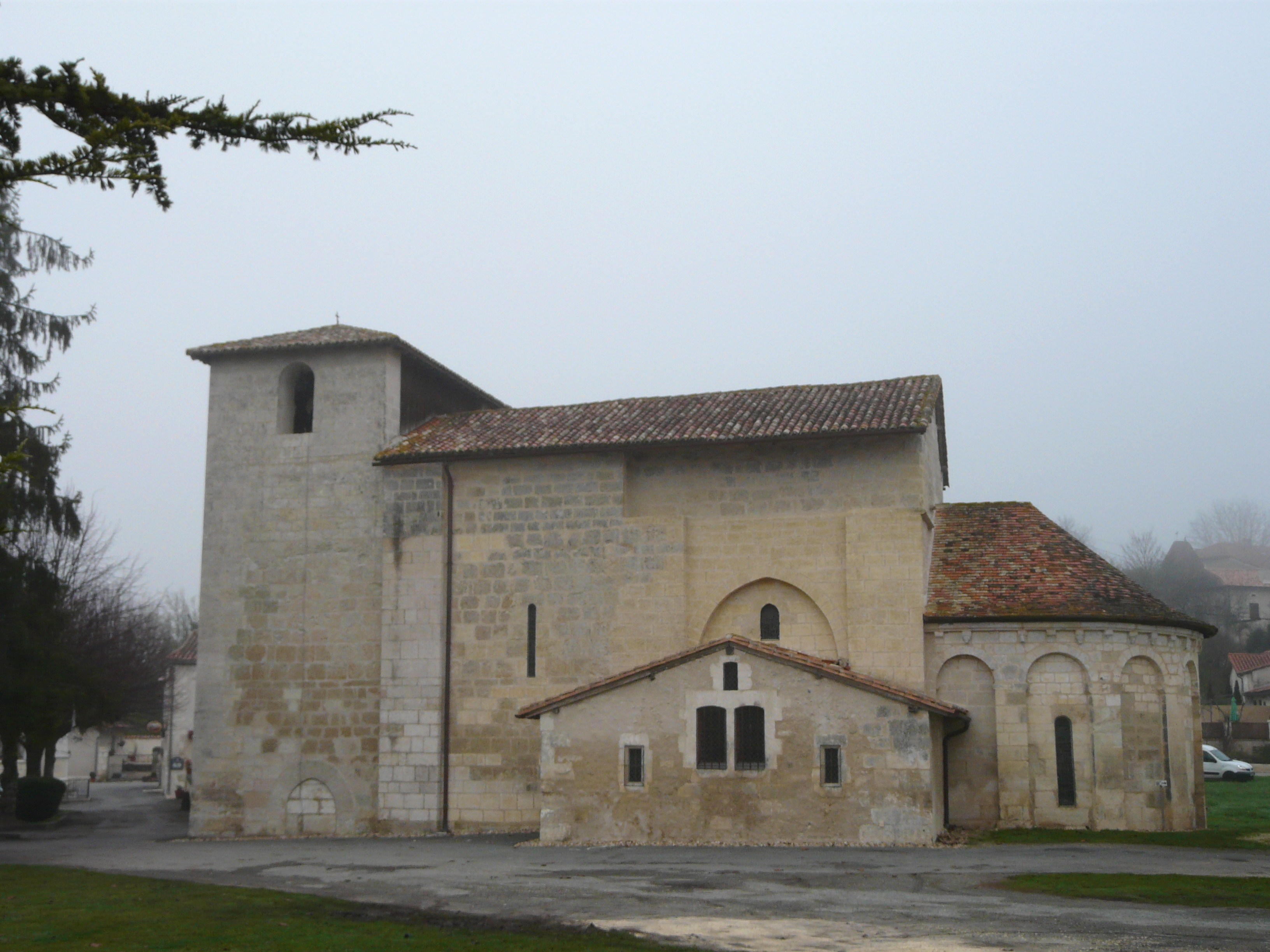 L'église Saint-Saturnin de Coutures, Dordogne, France.